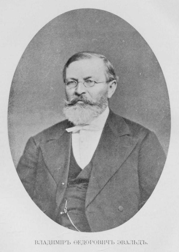 Владимир Фёдорович Эвальд (1823—1891) — российский педагог, директор 1-го Петербургского реального училища; действительный статский советник.